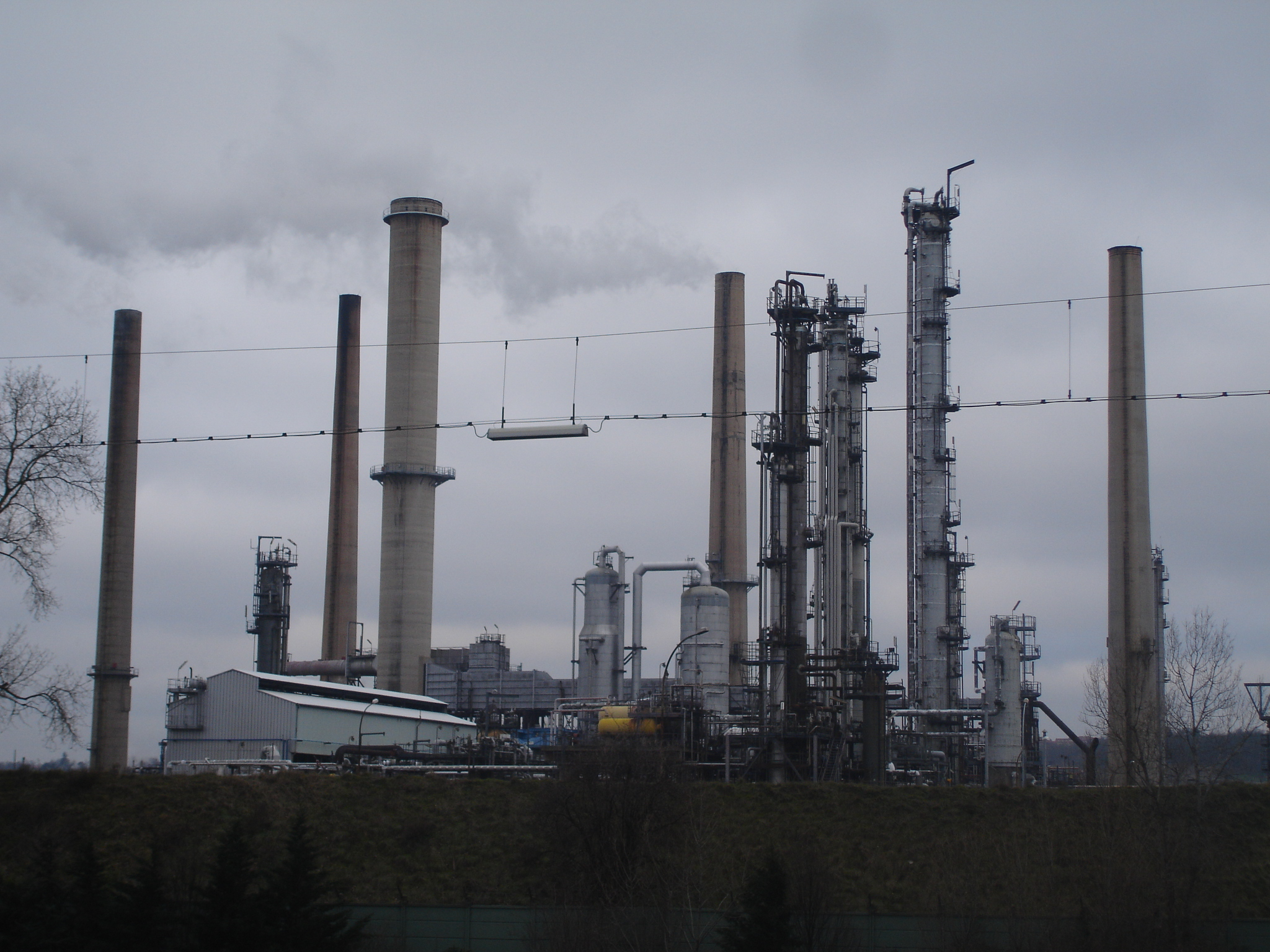 Raffinerie de Feyzin - vue de l'autoroute